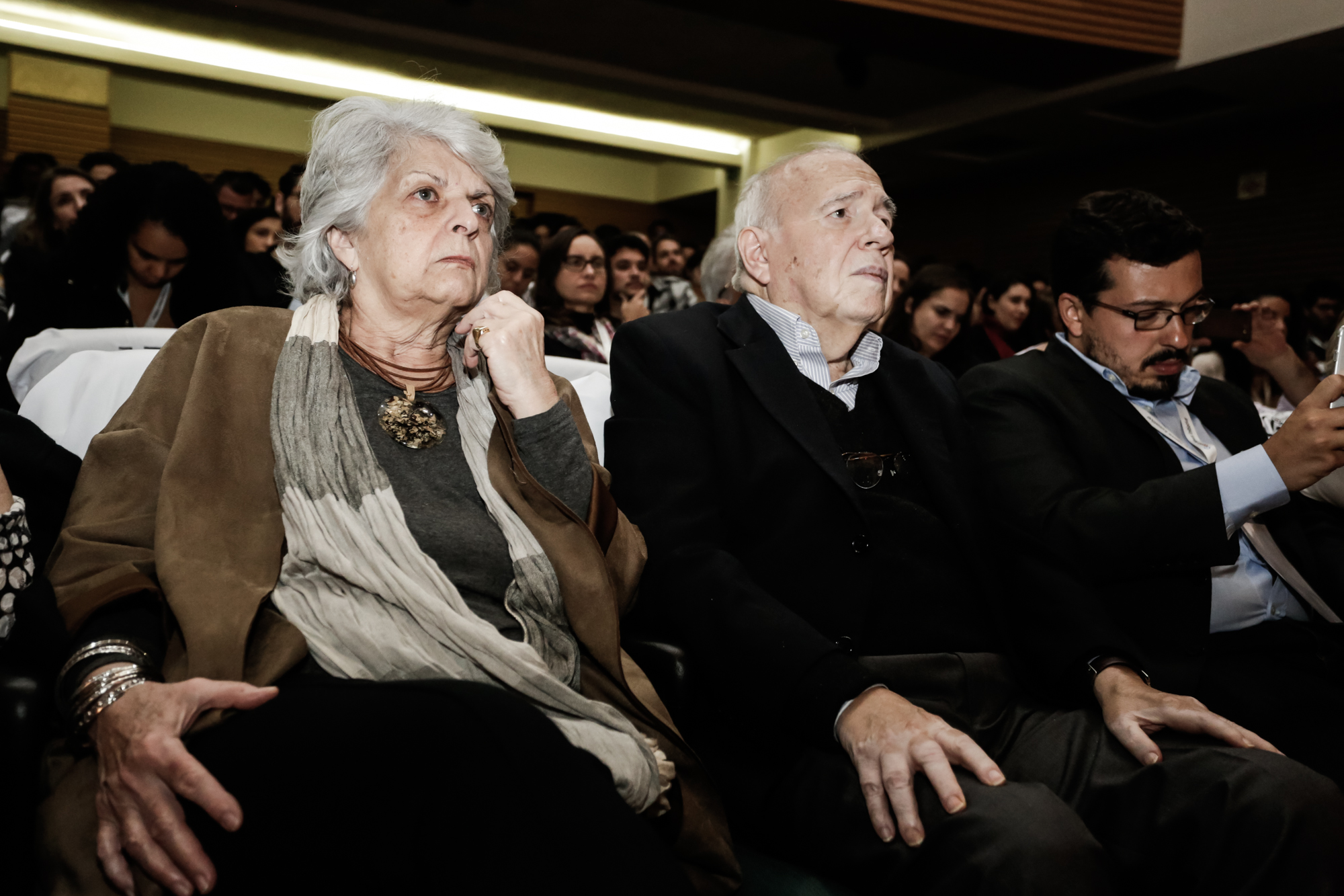 Sessão de homenagem a Zuenir Ventura no 13º Congresso Internacional de Jornalismo Investigativo (28/06/2018) Foto: Alice Vergueiro/Abraji